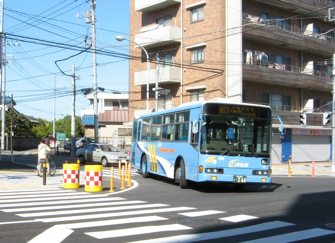 神奈川中央交通横浜営業所の路線で大船13系統天神橋循環。休日1本の免許維持路線。写真は免許維持区間から出てきたところで、バスの後ろ、乗用車の上に写っている停留所ポールが休日1回のみ使用される降車専用ポール。